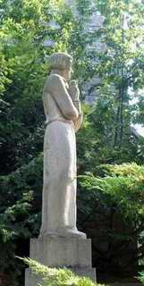 Eigenes Digitalfoto: Juergen Bode 2002 Zum Artikel selbst angefertigt Juergen Bode 18:05, 13. Jul 2004 (CEST)